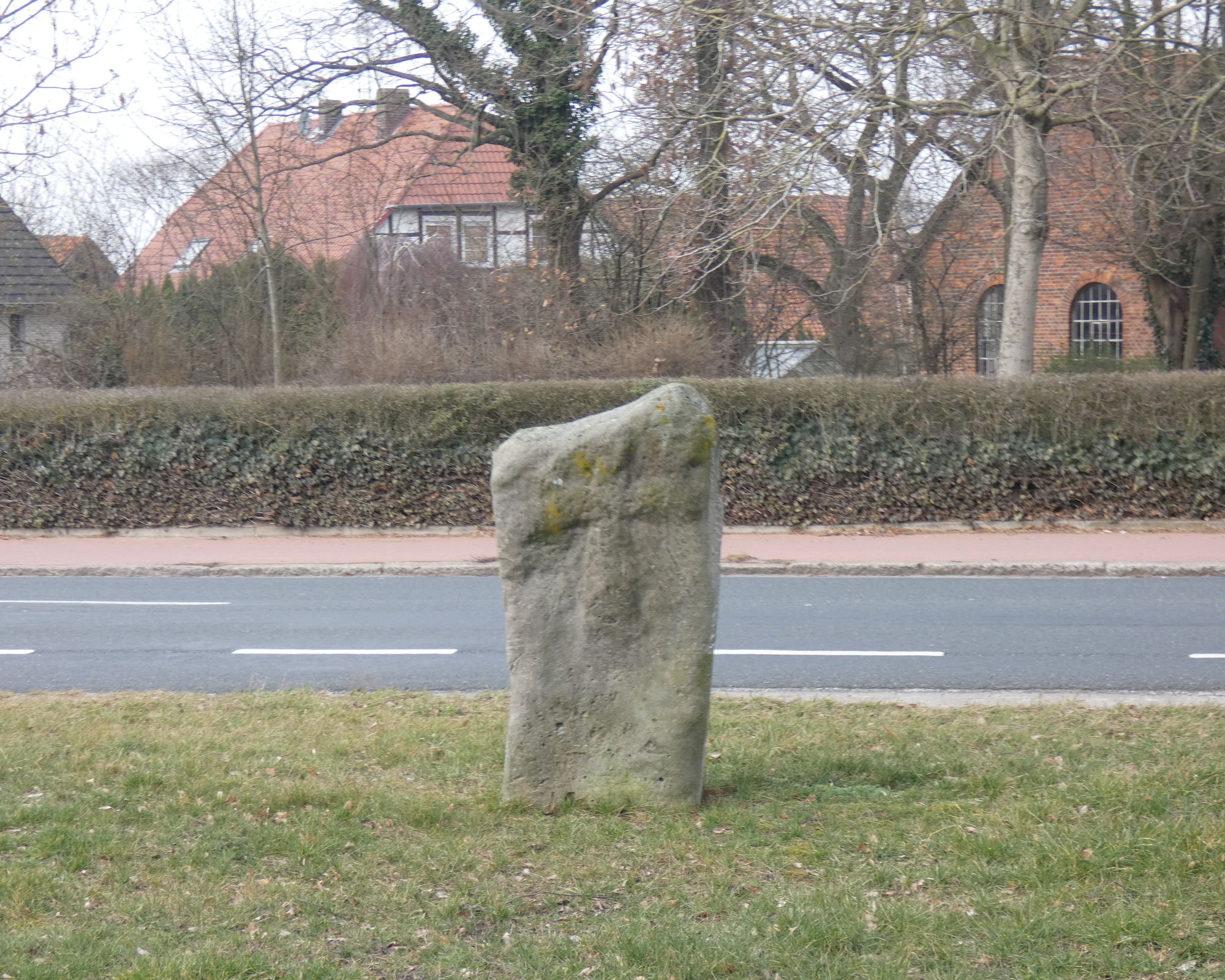 Der sogenannte Schwedenstein ist ein Kreuzstein in Northen, einem Stadtteil von Gehrden in der Region Hannover in Niedersachsen. Er ist einer der wenigen im früheren Landkreis Hannover erhaltenen Kreuzsteine und steht unter Denkmalschutz.